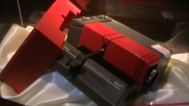 Slide Projektor